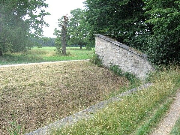 Ein Ha-Ha im Schlosspark Nymphenburg, Muenchen